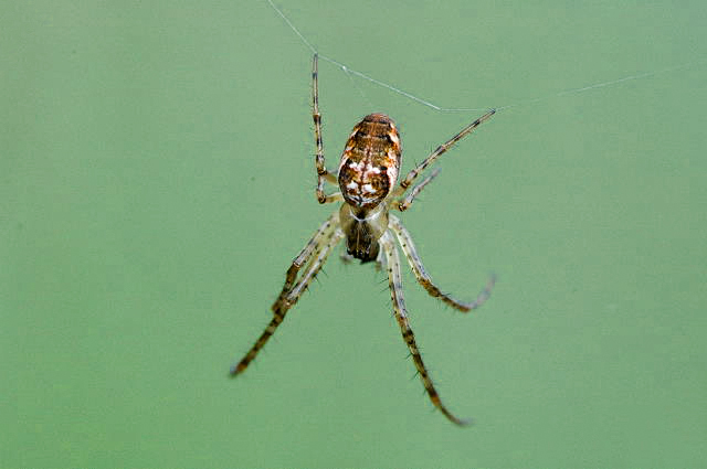 female Metellina mengei from Commanster, Belgian High Ardennes .